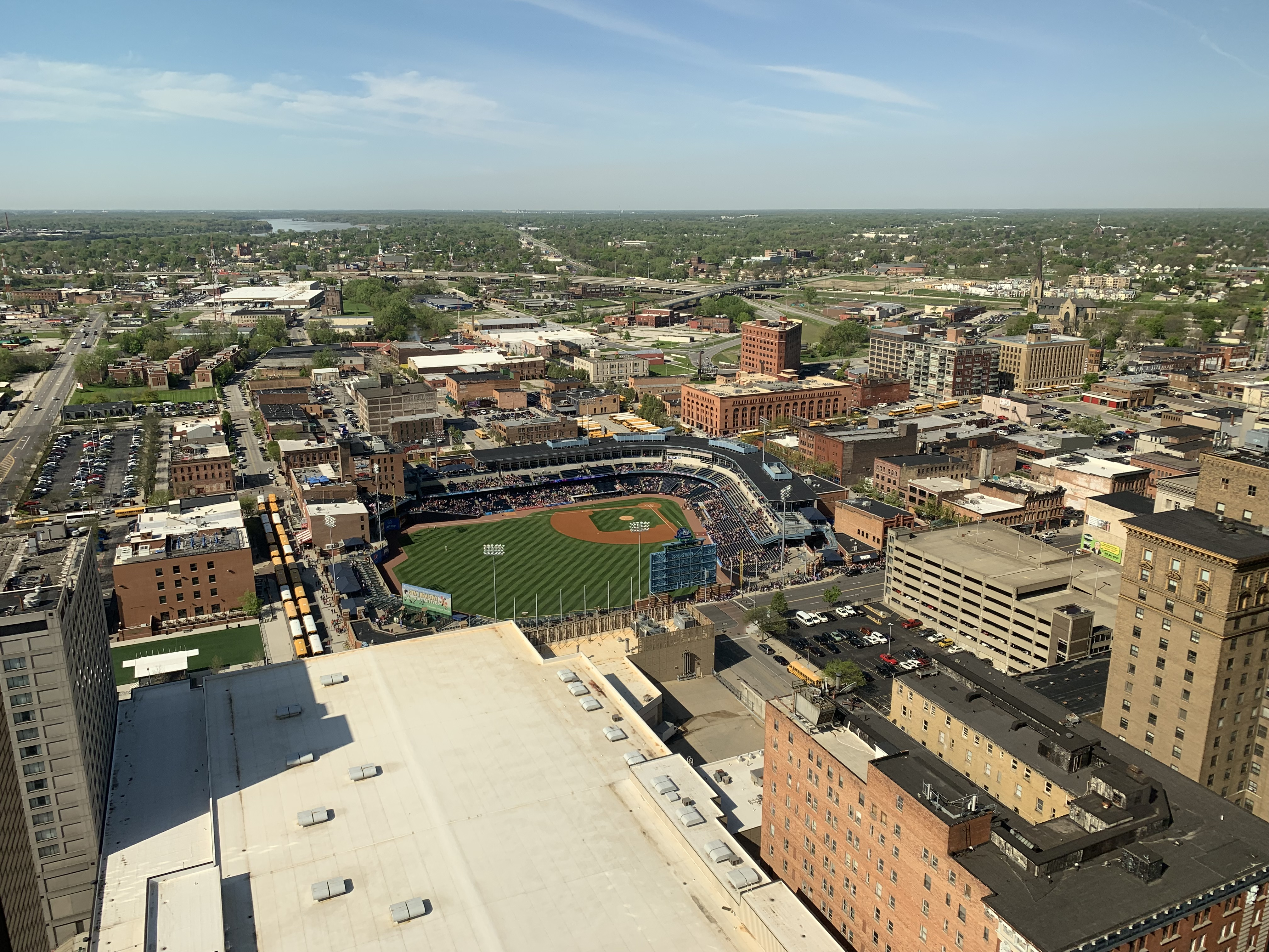 五三體育場。